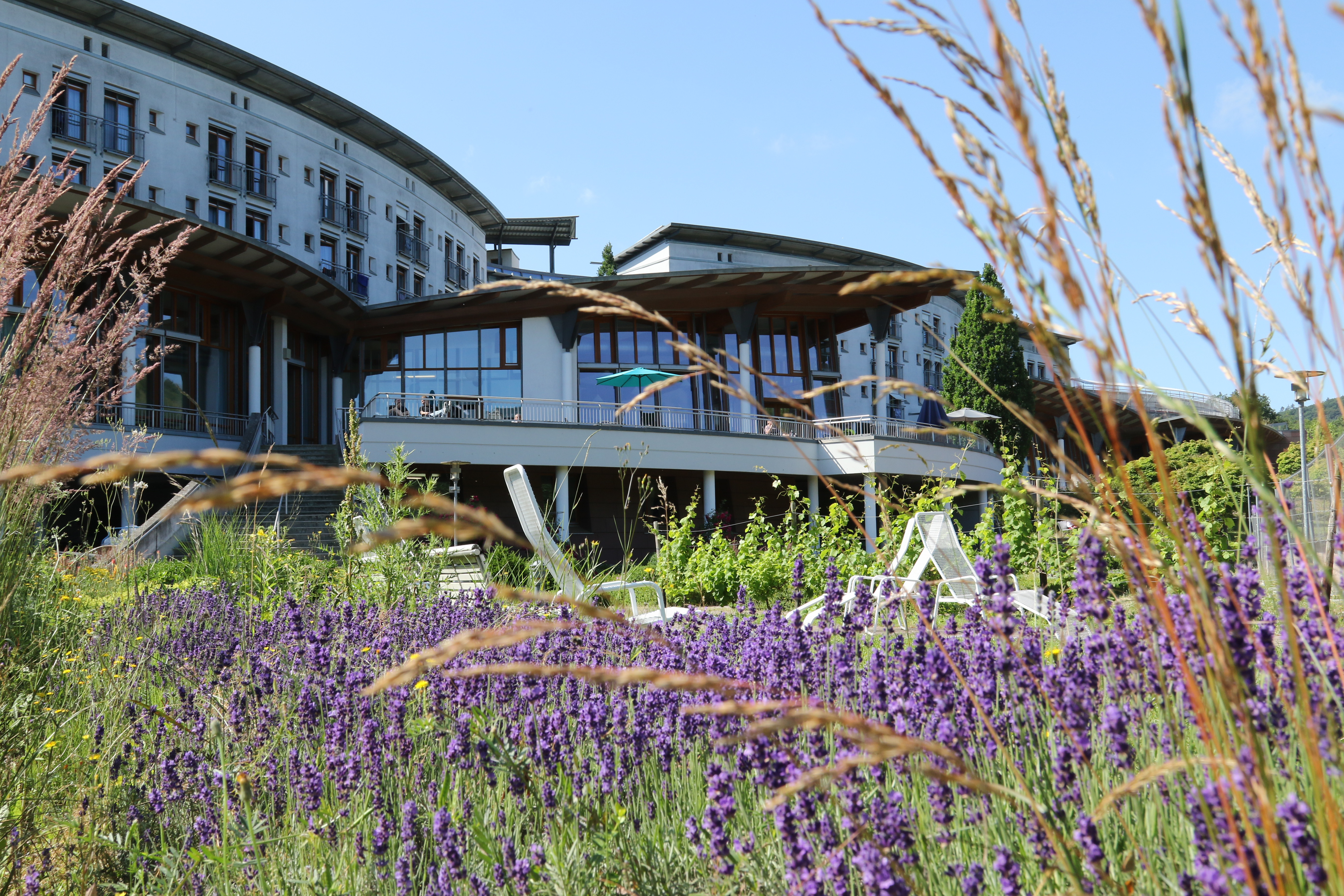 Außenaufnahme der Drei-Burgen-Klinik. Foto: Walter Hoinka.